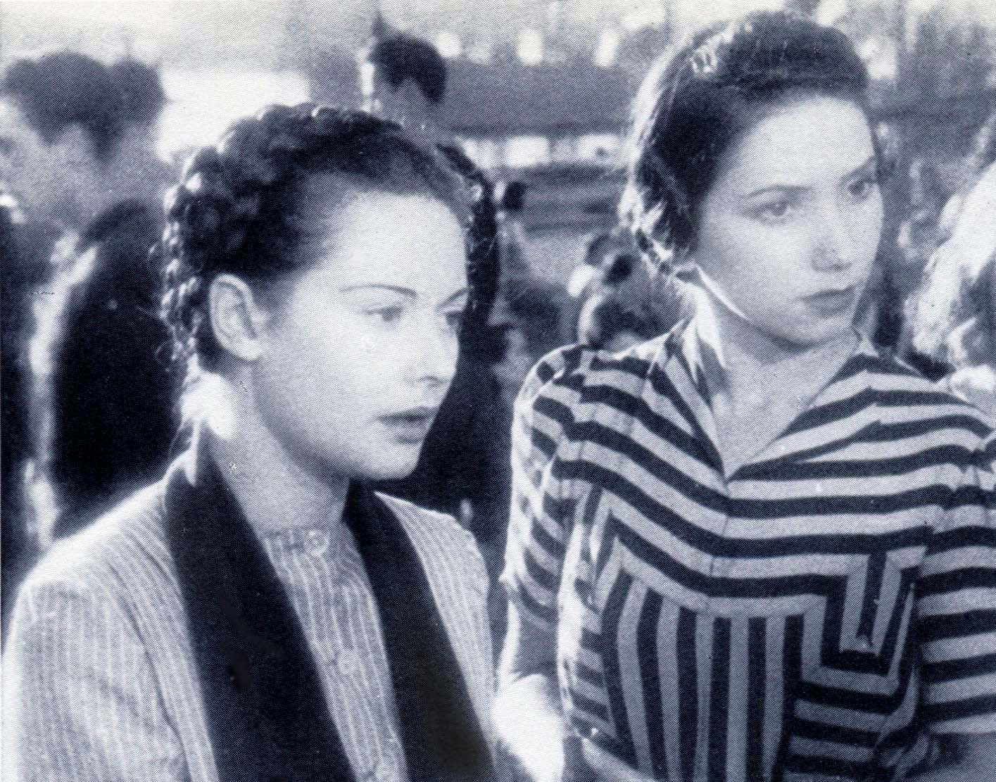 Maria Denis e Dhia Cristiani in "Sissignora" (Poggioli, 1941)